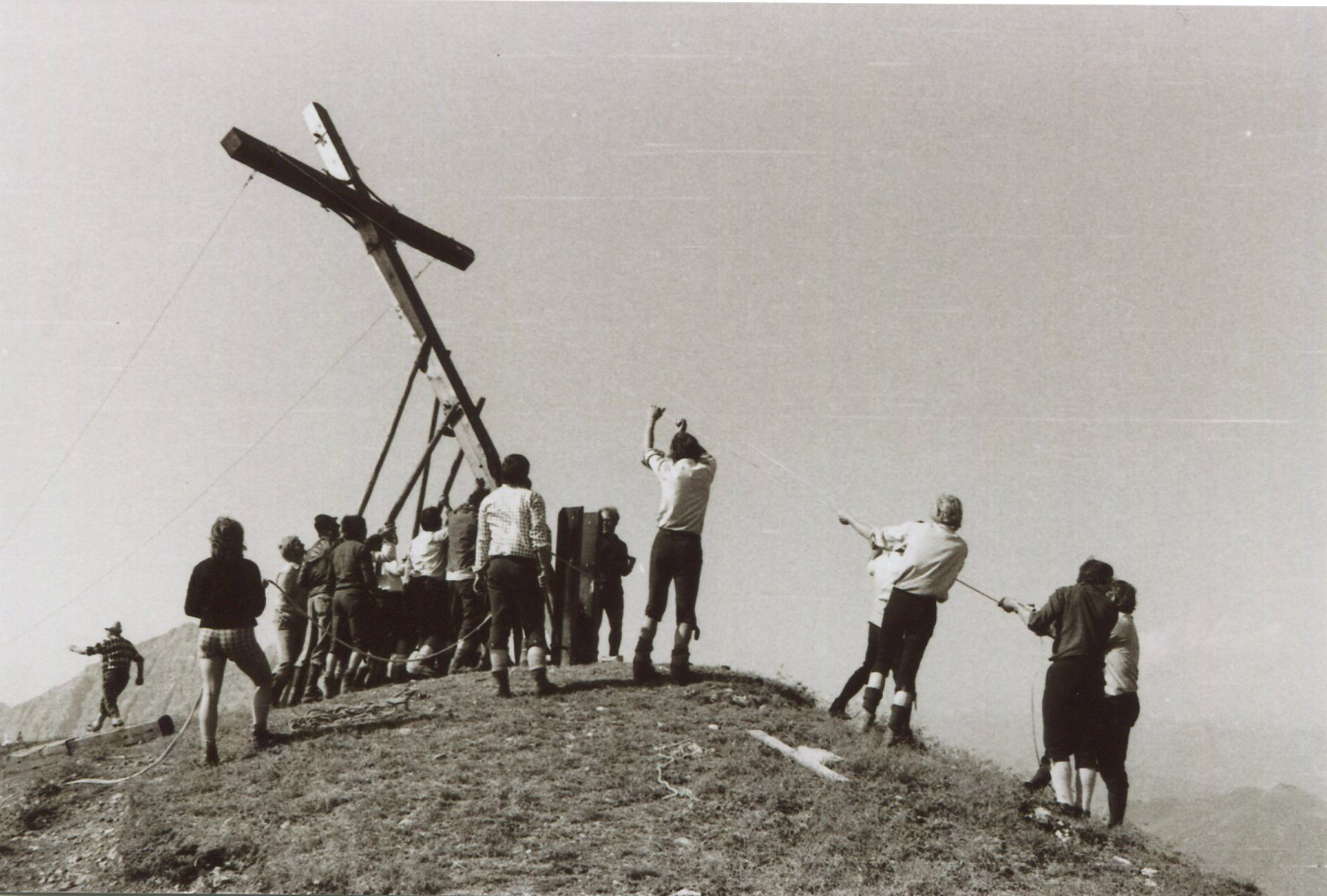 Im August 1974 wurde von der Bergwacht Götzens (auf Initiative des Leiters der Bergwacht Götzens Werner Singer) erstmals auf dem höchsten Punkt der Saile ein Gipfelkreuz aufgestellt.